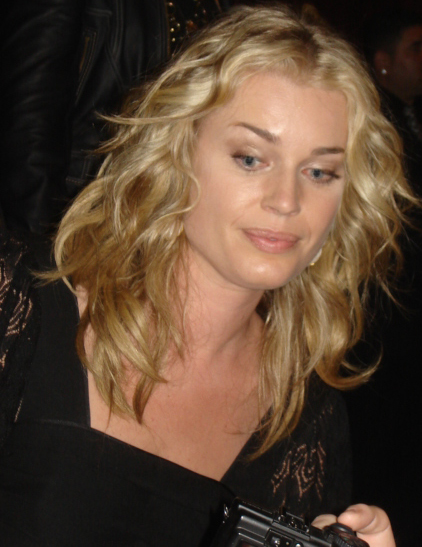 Rebecca Romijn plays Alexis